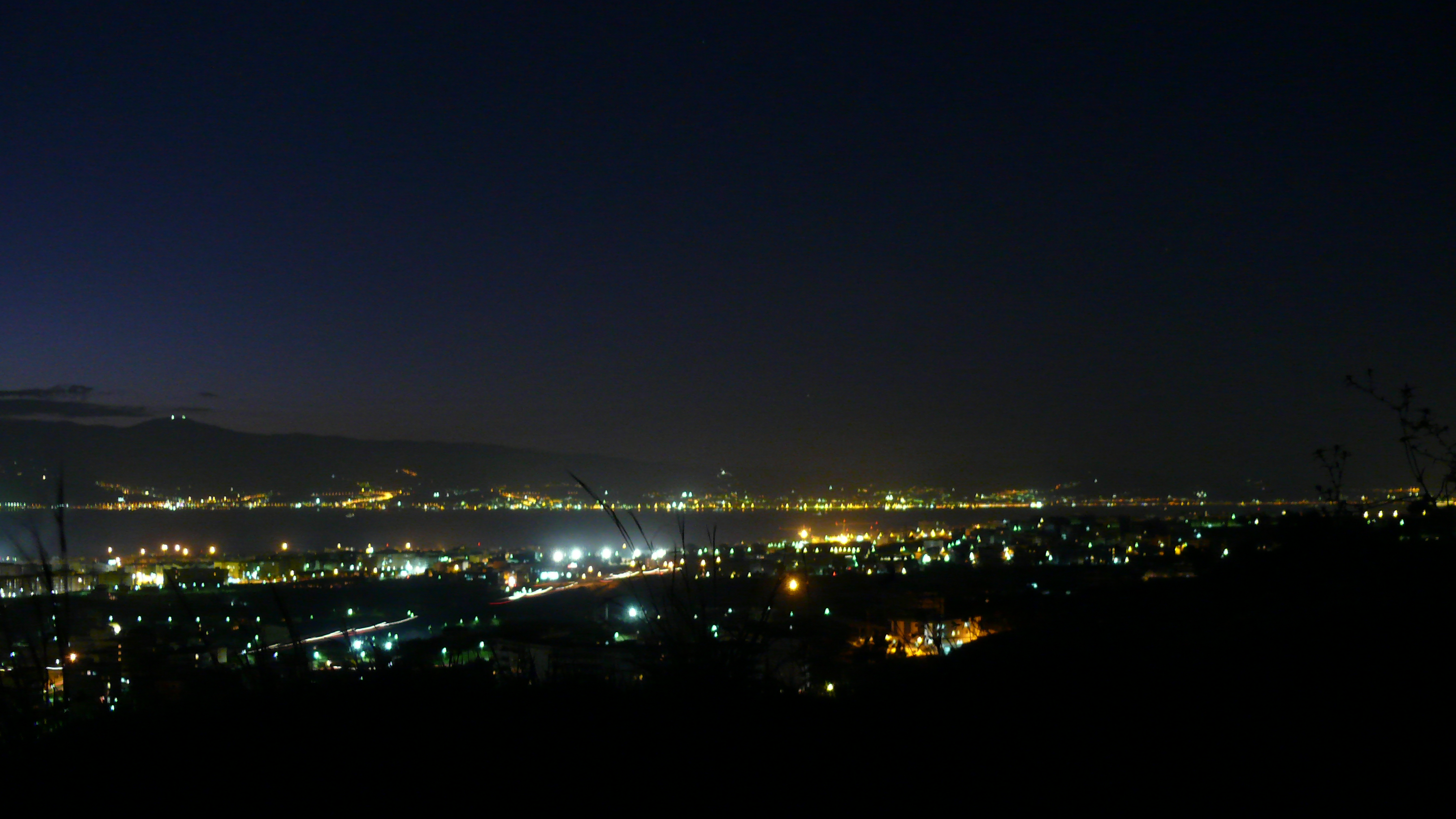 città di Reggio Calabria in notturna vista dal quartiere Gallina, di sfondo la Sicilia e lo stretto di Messina